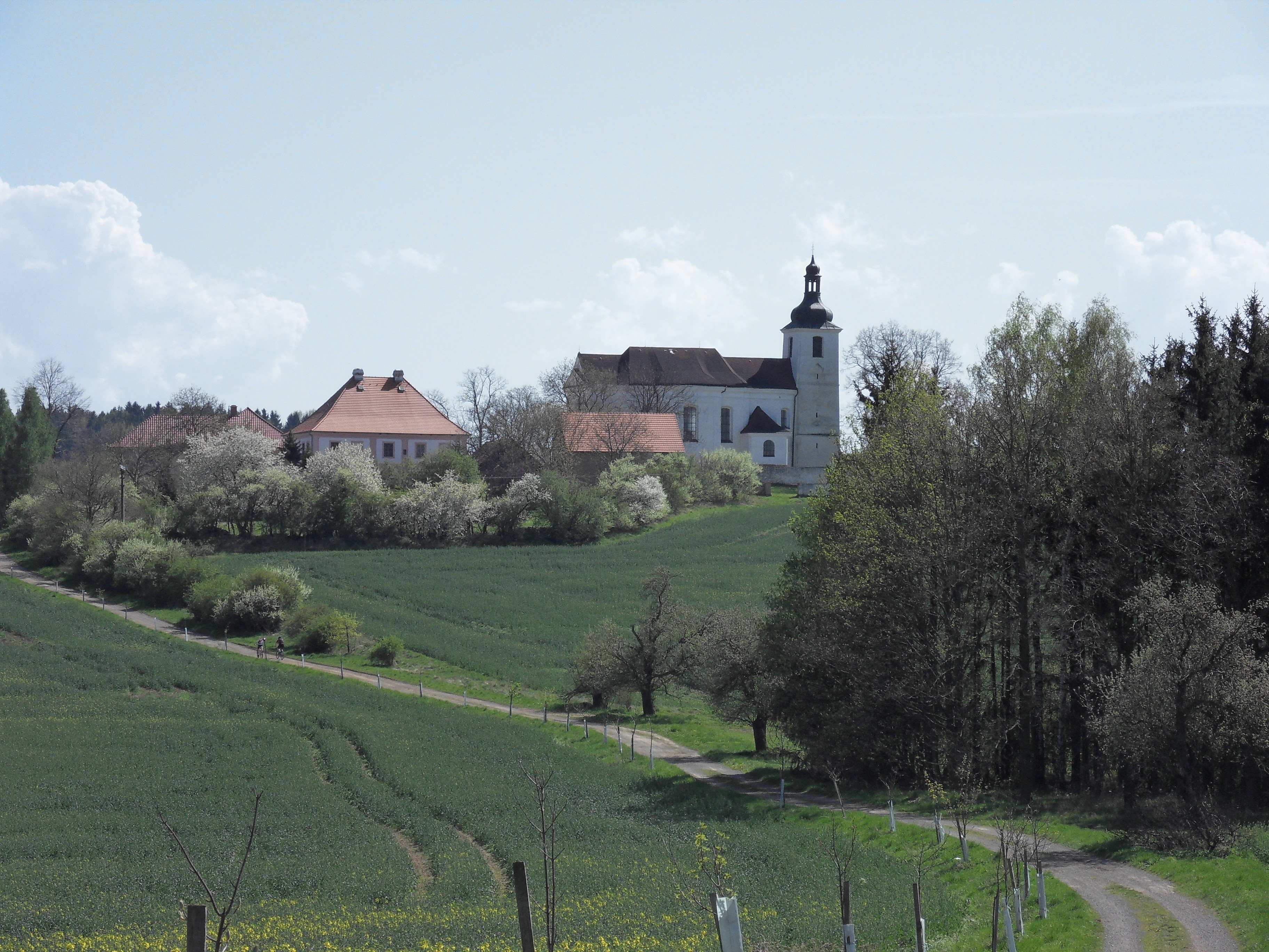 Kostel sv. Jakuba Většího, Na Prusinách, Nebílovy, okr. Plzeň-jih